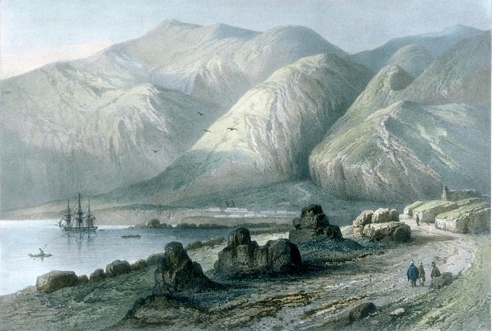 Rada de Cobija por Jean Victor Adam, 1841